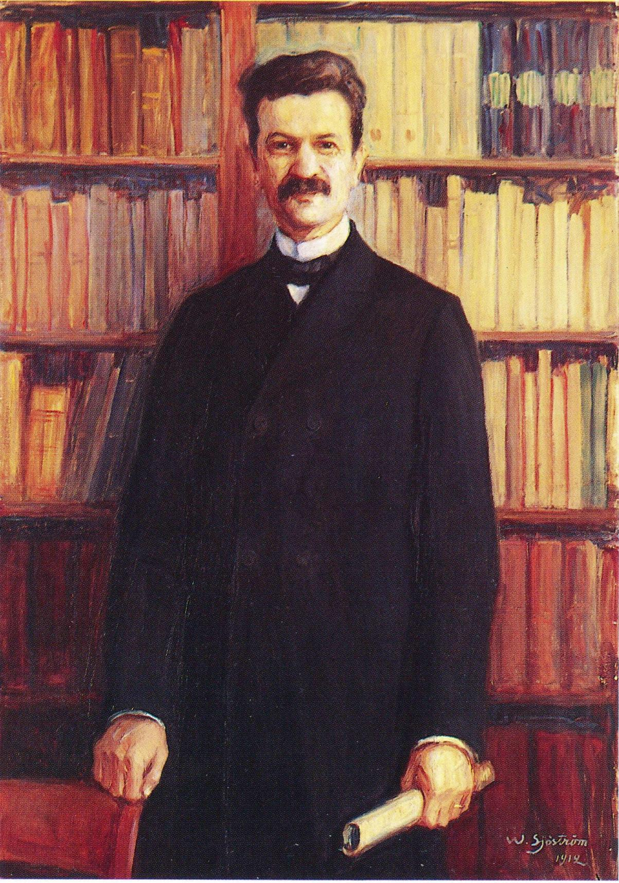 Kansanrunoudentutkimuksen professori Kaarle Krohn (1863–1933). Muotokuvan omistaa Helsingin yliopiston Eteläsuomalainen osakunta.